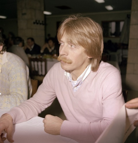 Santiago Idigoras in 1981